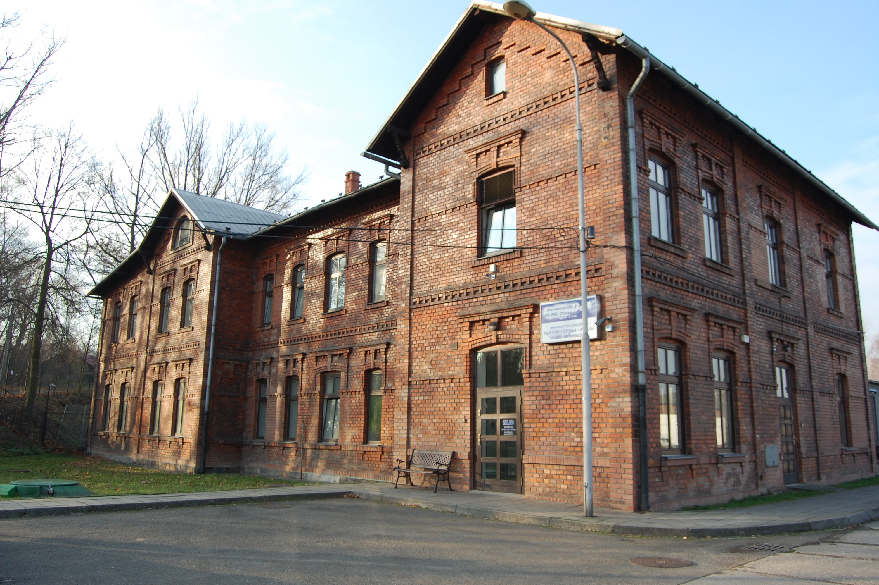 Správní budova bývalého hlubinného černouhelného dolu v Orlové-Porubě